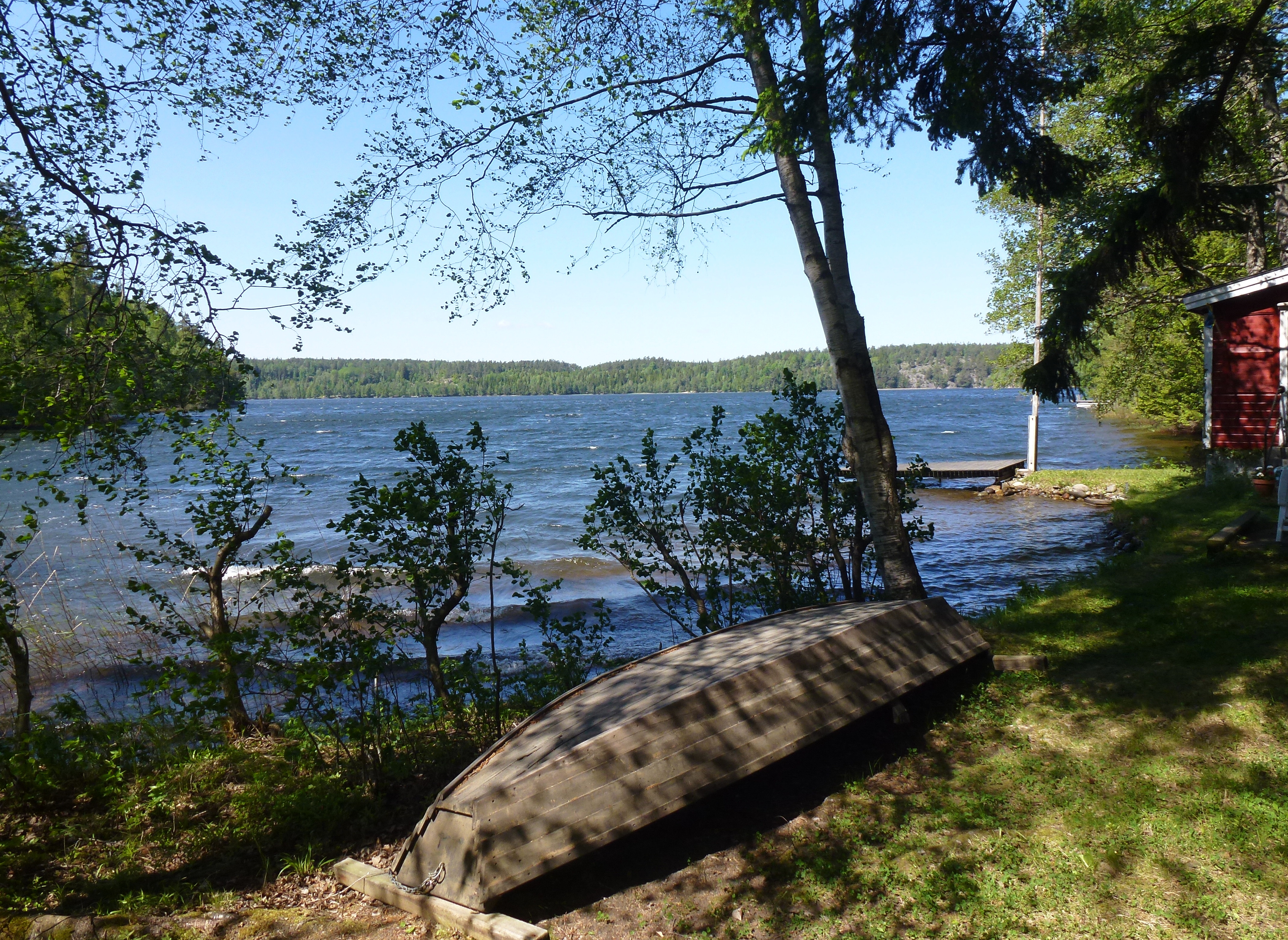 Grindsjön i Botkyrka kommun